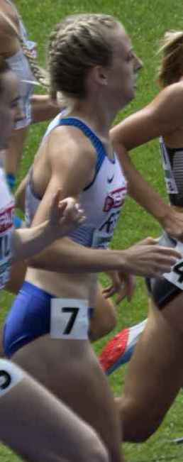 EKB42099 elise vanderelst 1500m